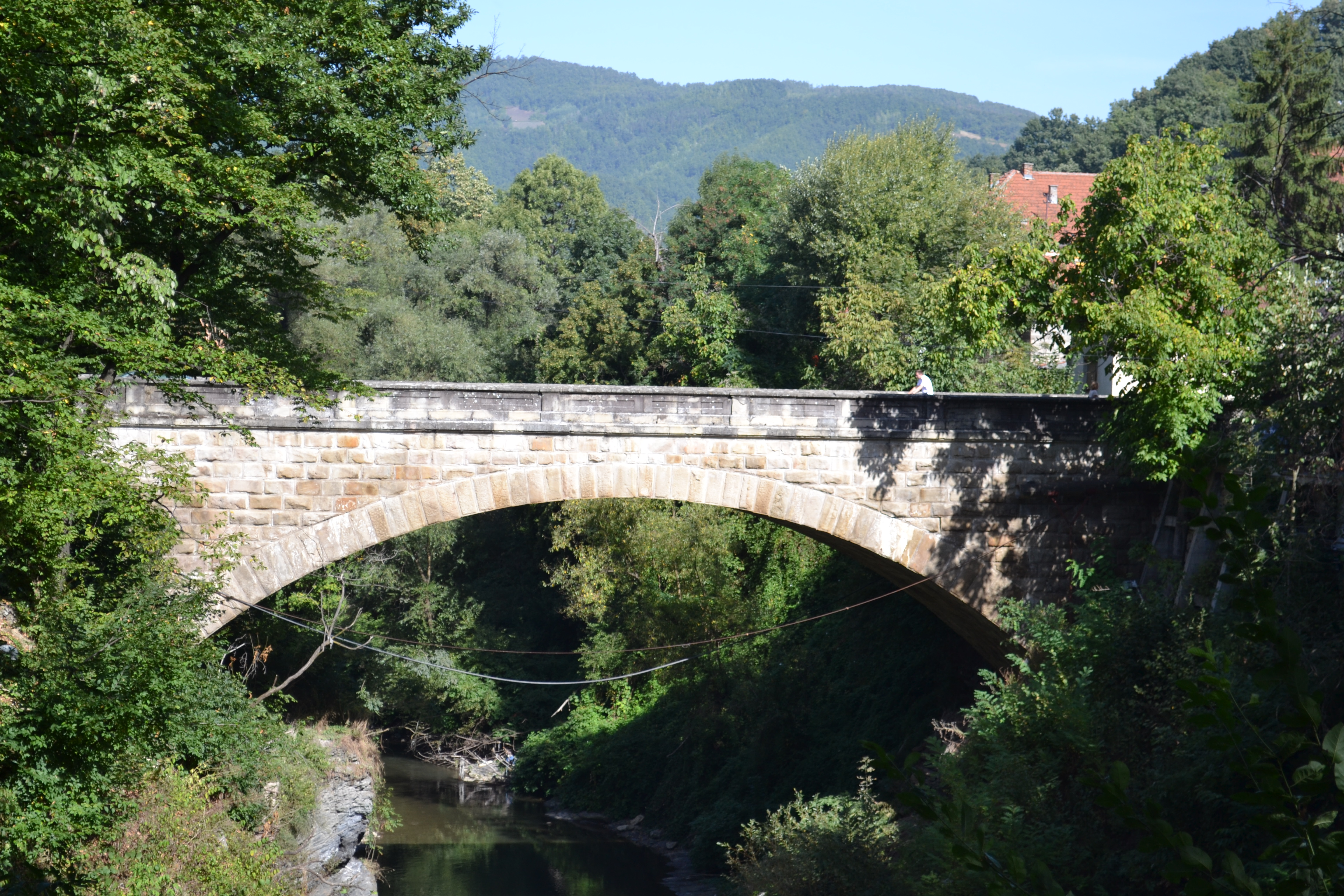 Kameni most u Ivanjici